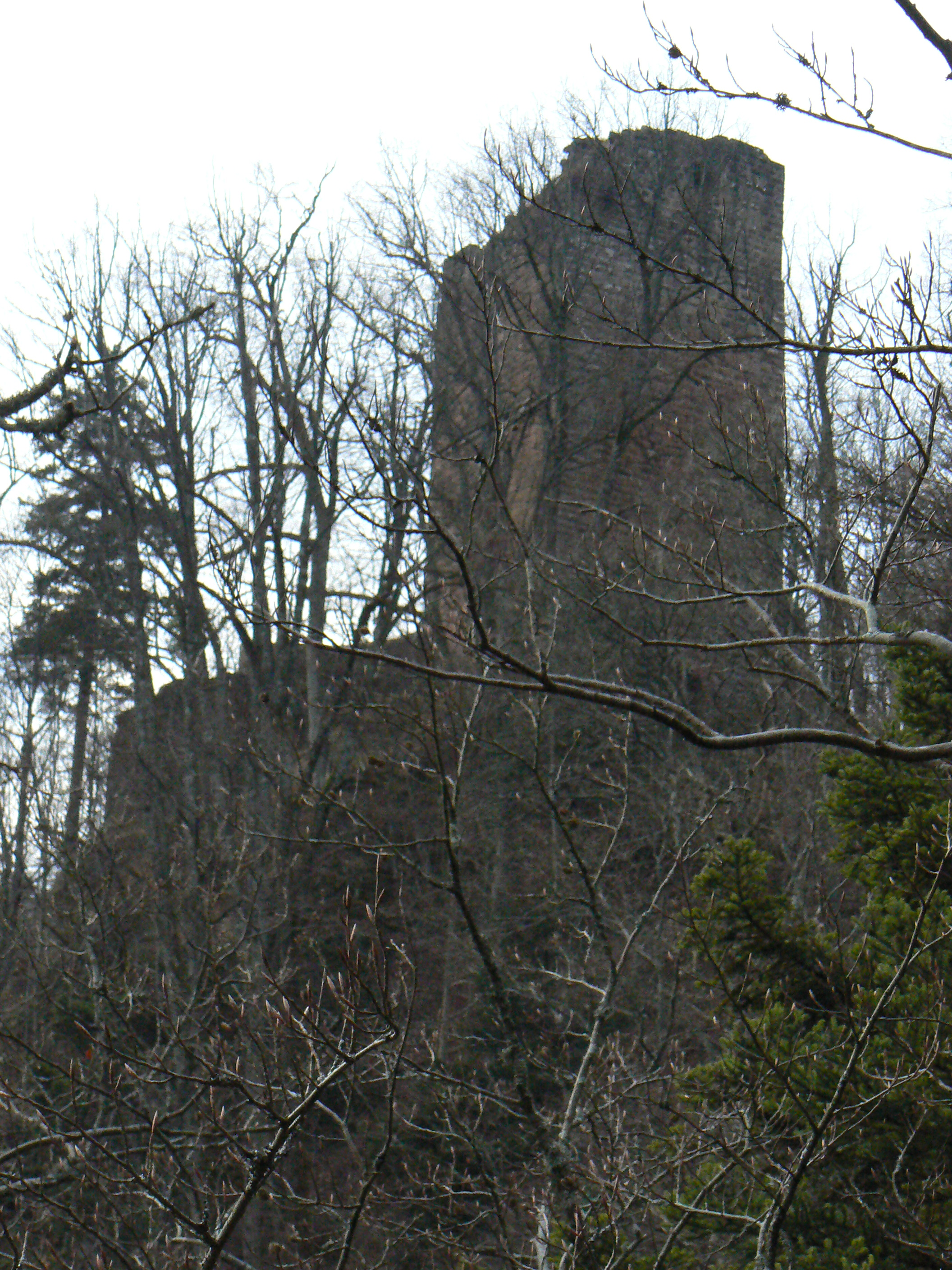 Ruines du Nideck vues de la cascade (Bas Rhin-France)